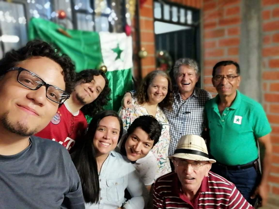 Kaliaj esperantistoj kuniĝis por festi la tagon de Zamenhof en 2018 Esta fotografía fue tomada en el municipio colombiano con código 76001.